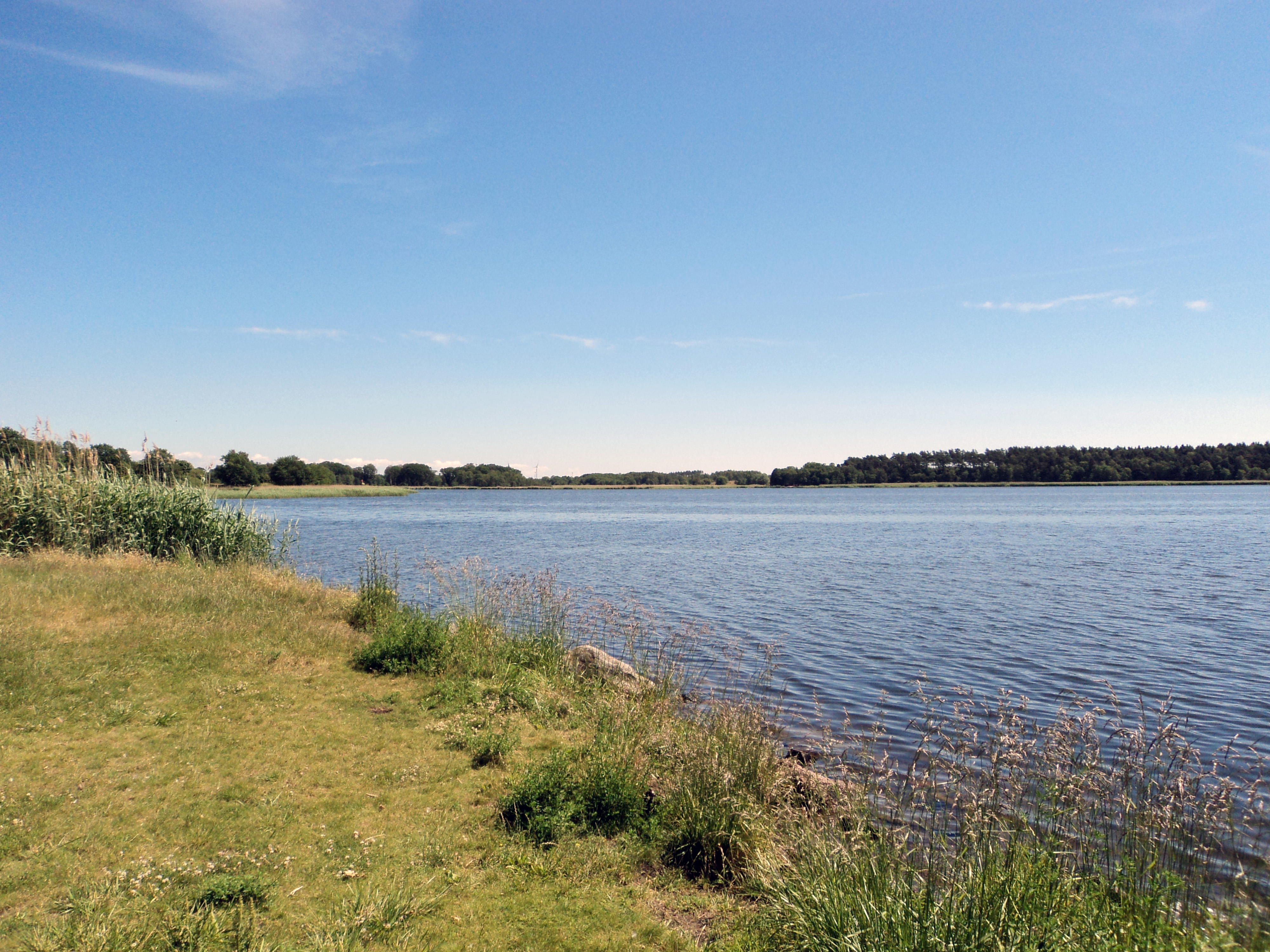 En del av Sölvesborgsviken i Sölvesborg